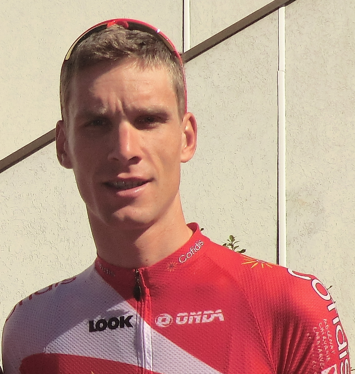 Départ de l'hôtel Lyon-Est de Saint-Maurice-de-Beynost de l'équipe Cofidis au matin de la seconde étape du Tour de l'Ain 2013.